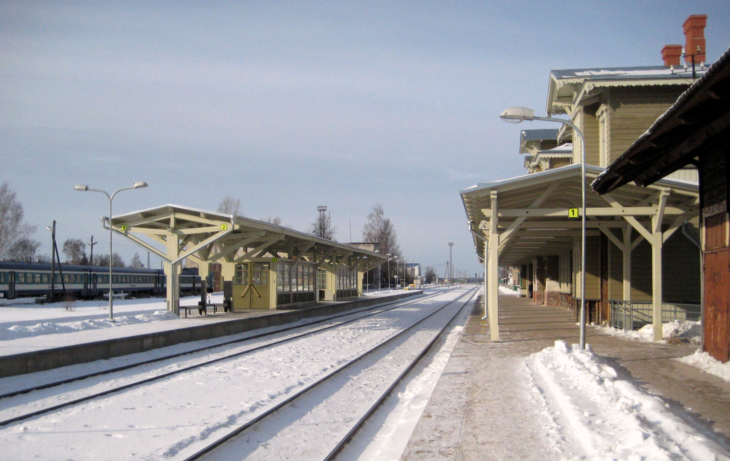 Tartu raudteejaama perroonid 2012